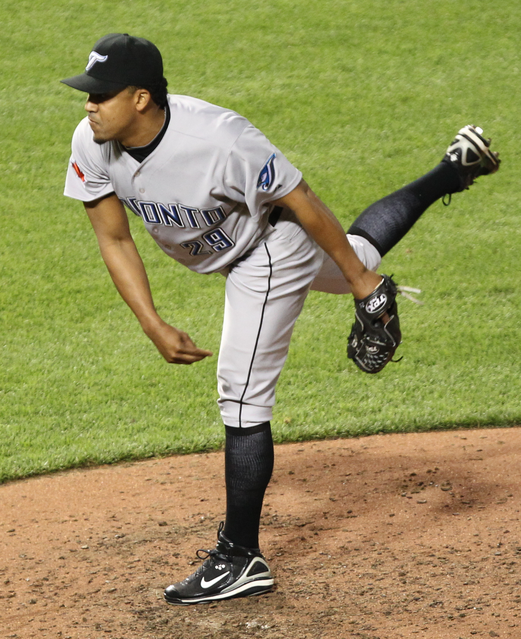 Octavio Dotel